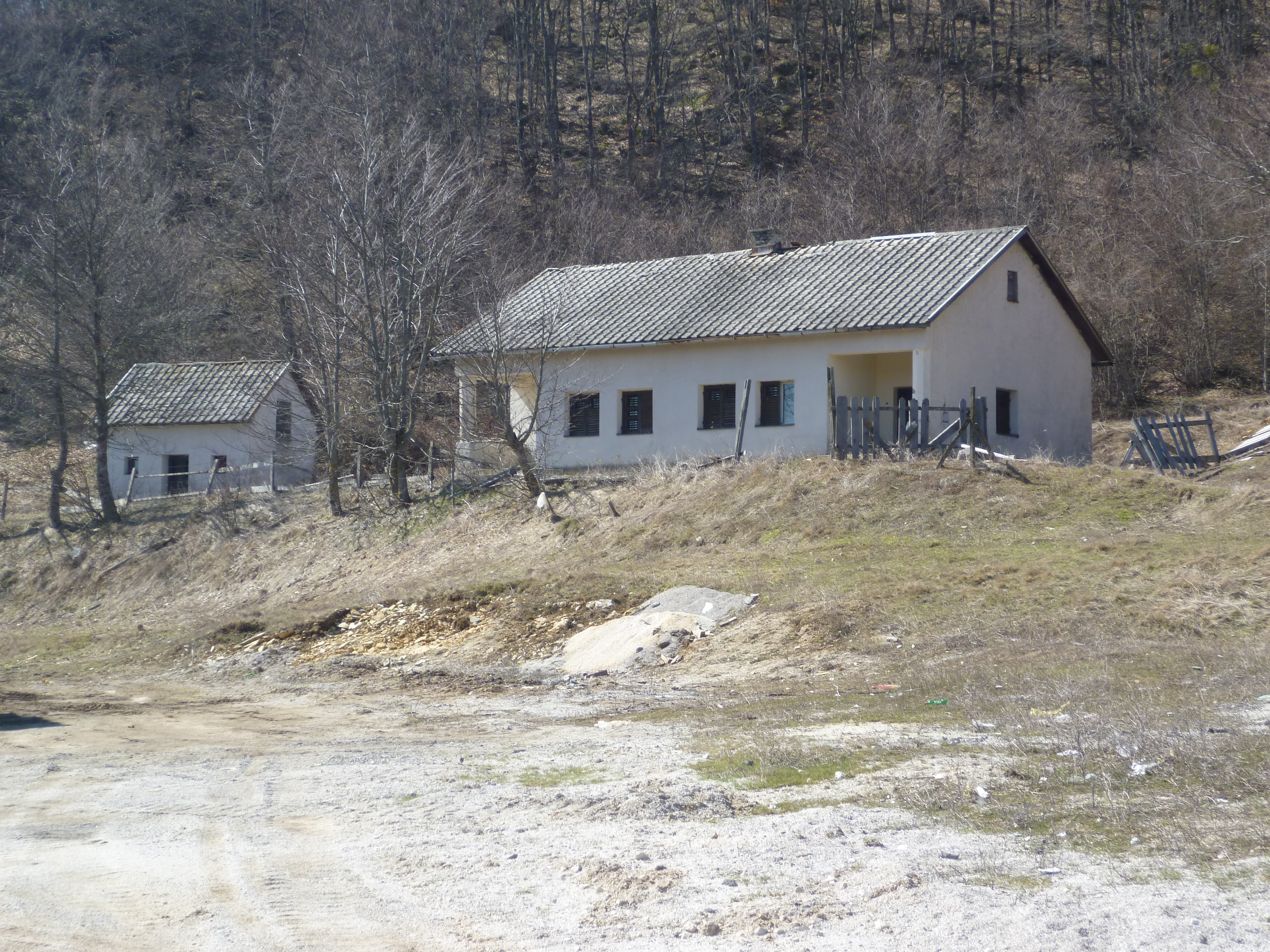 Lokacija na kojoj se snimao film